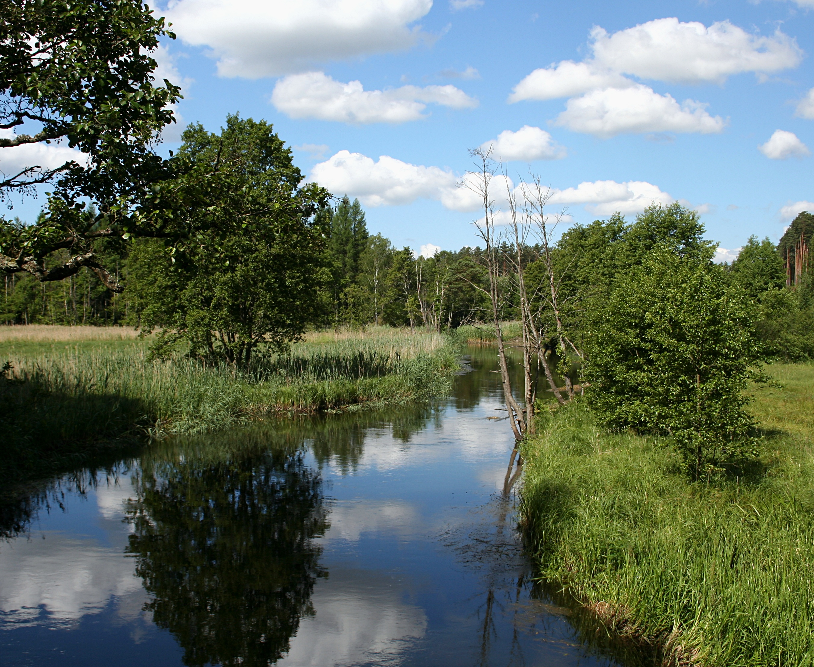 Zaborski Park Krajobrazowy, Brda w pobliżu rezerwatu "Jezioro Małe Łowne"